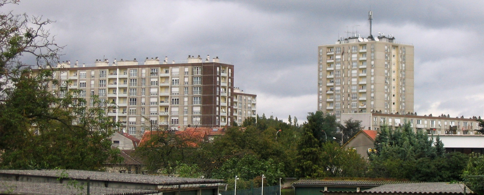 Immeubles du quartier du Marché Marais vus depuis avenue du Général Patton.